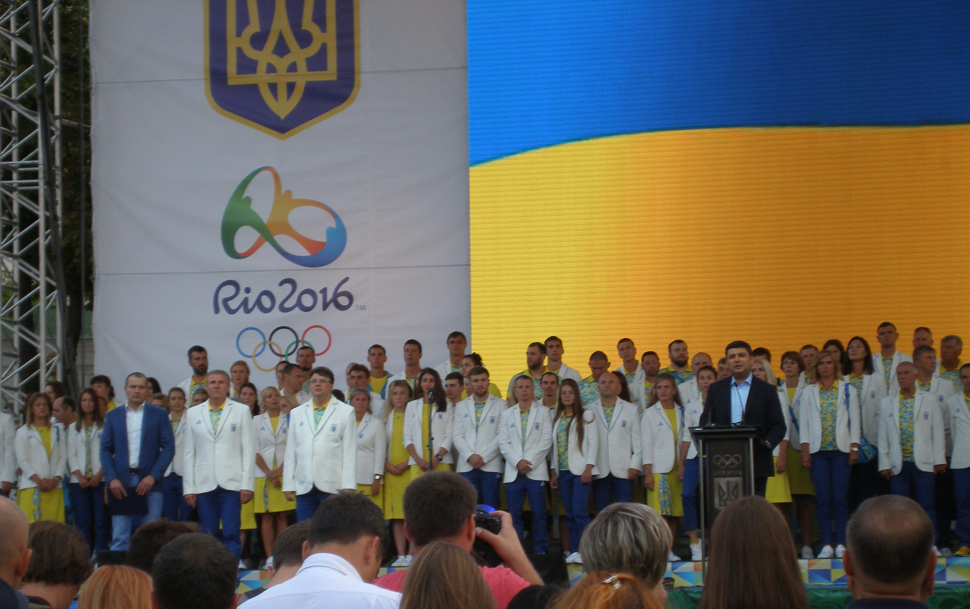 Олімпійська збірна України під час проводів збірної на Олімпіаду-2016 на Софійській площі в Києві.